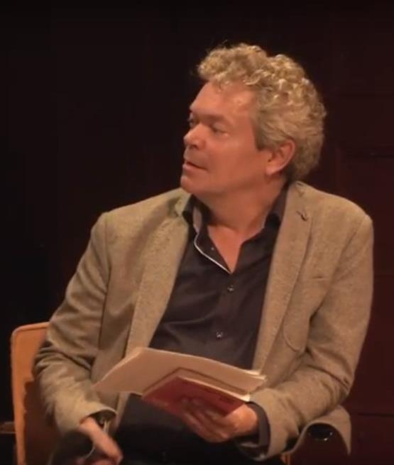 Kort na de Wereld Suïcide Preventie Dag (10 september) praat Coen Verbraak na de voorpremière van de film Voorland is Back met regisseur Susanne Heering over haar zus Annemartien, die op haar 32ste voor een trein sprong. Met psychiater Jim van Os, auteur Marian Donner, theoloog Christa Anbeek en Susanne Heering gaat hij in op de vraag hoe onze maatschappij anders ingericht moet worden om deze stijgende trend tegen te gaan.